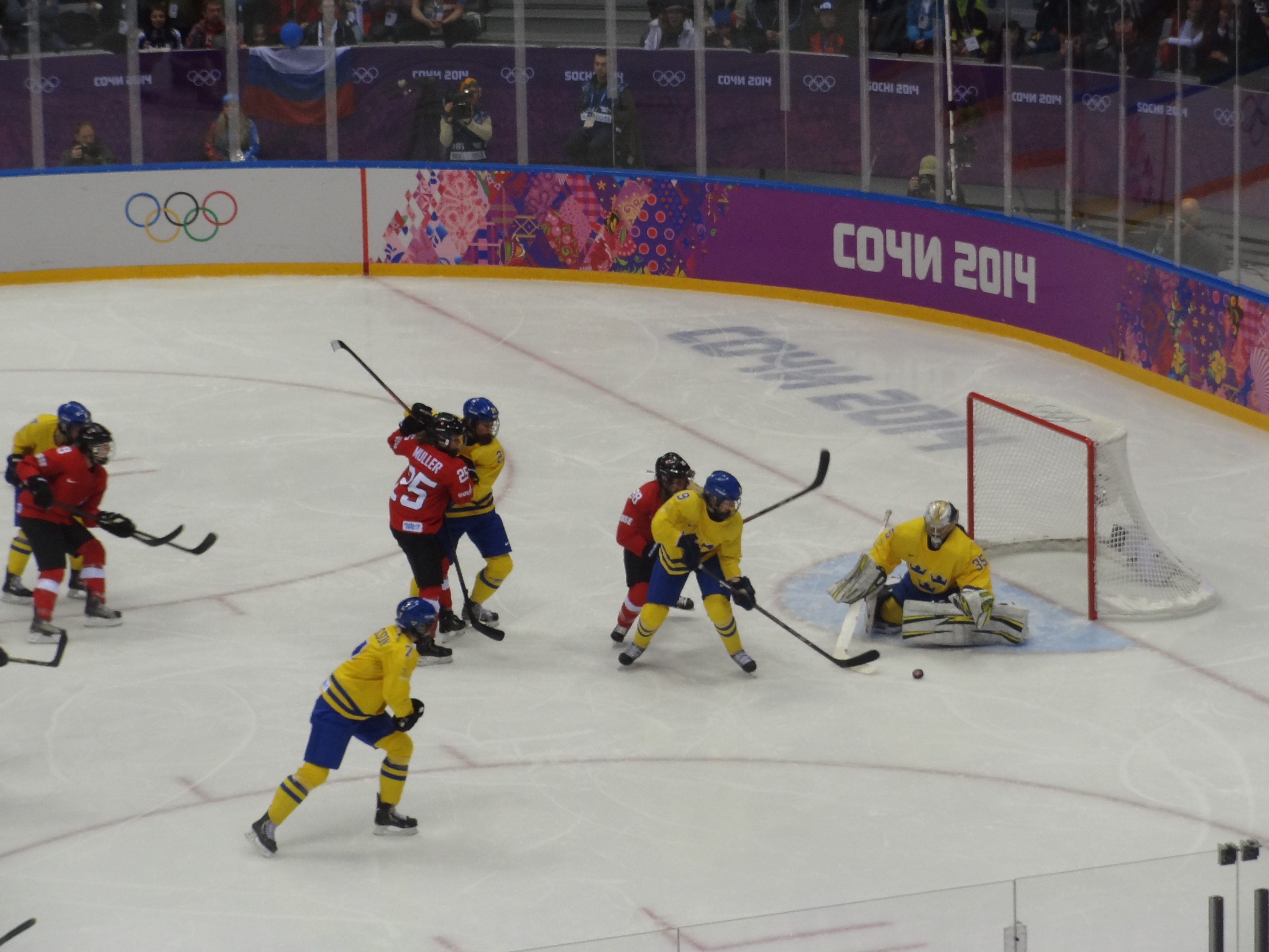 XXII Олимпийские зимние игры. Сочи, 20 февраля Хоккей. Женщины. За третье место. Швеция – Швейцария – 3:4 (1:0, 1:0, 1:4).